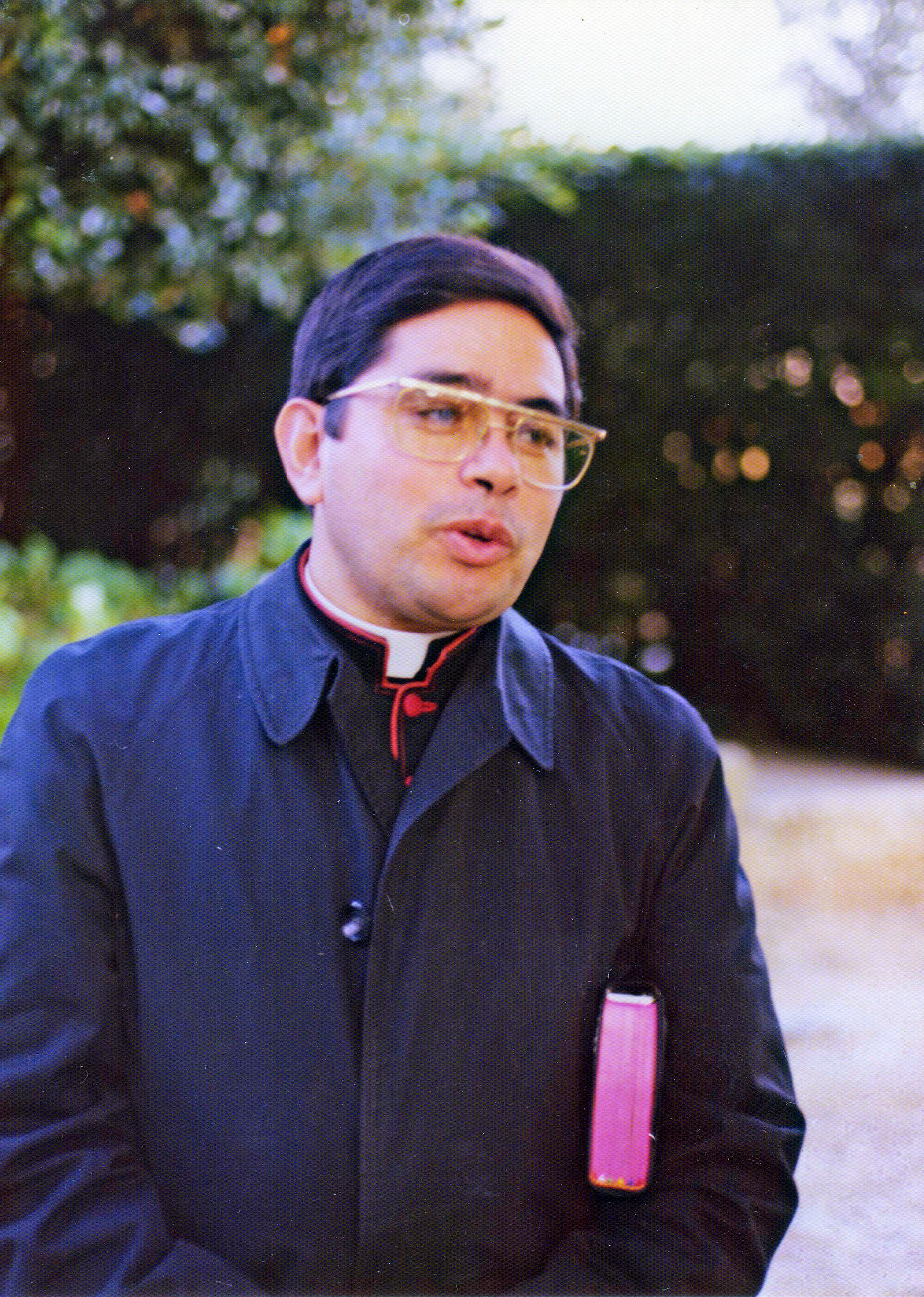 Roma, Año Santo 975